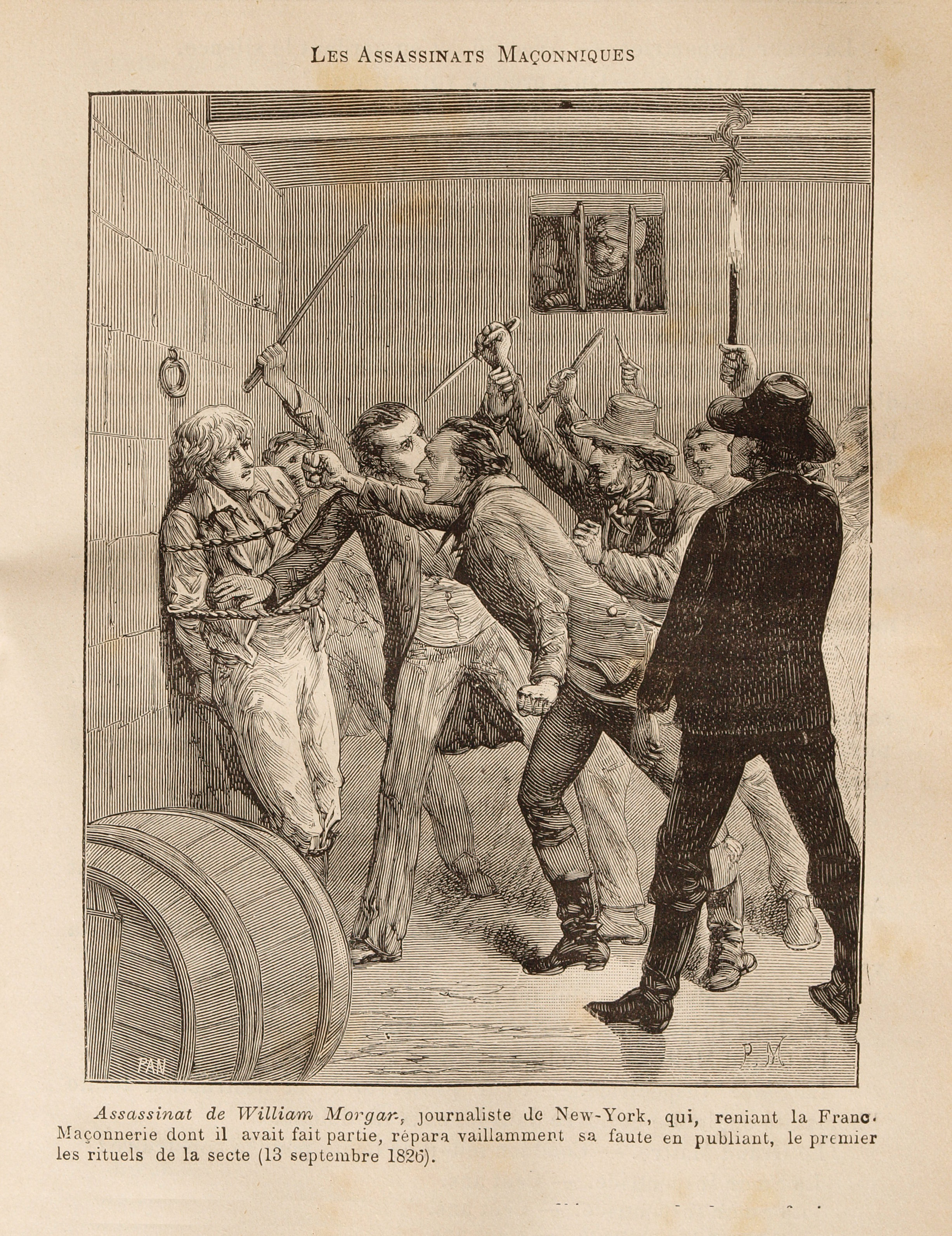 Une des gravures du document de Léo Taxil, Les Mystères de la Franc-Maçonnerie, Paris, 1886.